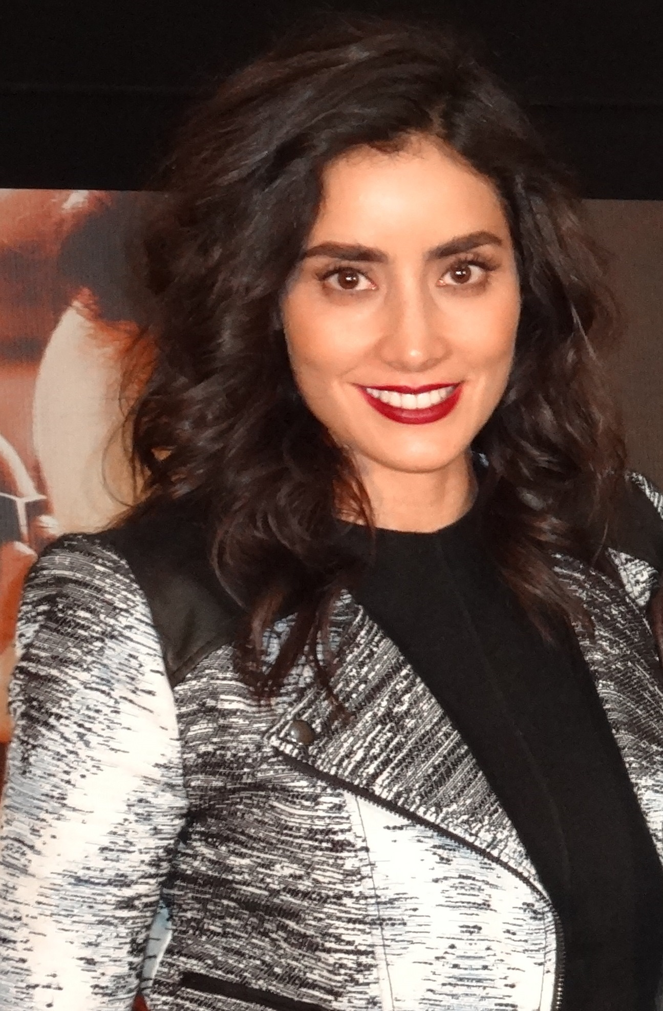 Paola Núñez durante la promoción de la película "Dariela los martes" en 2014.